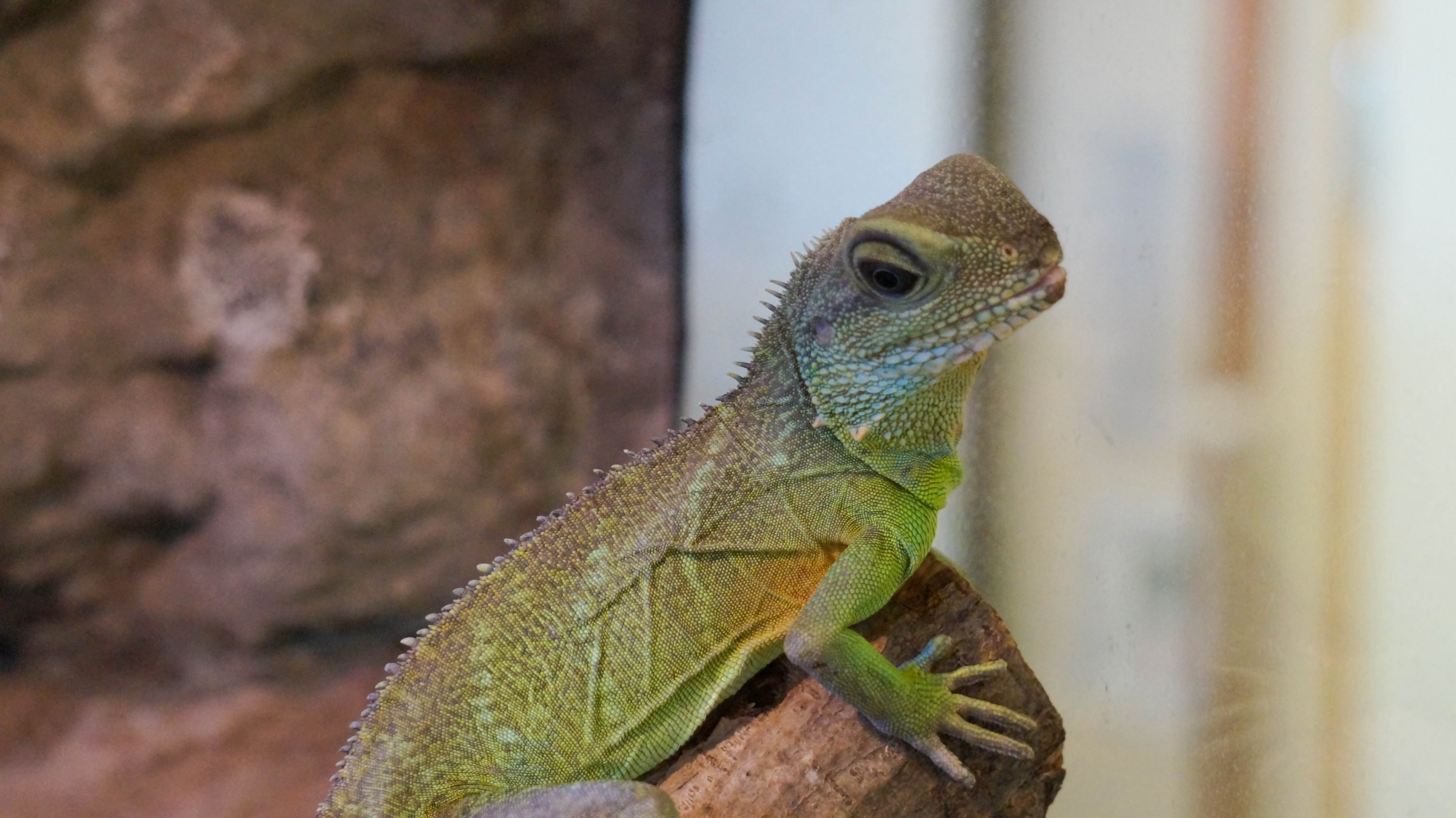 En av reptilerna vi har på skolan.